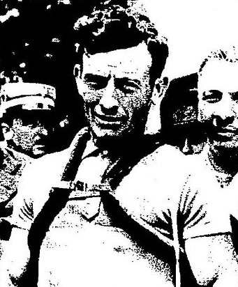 Le Belge Henri Garnier, vainqueur du Tour de Suisse en juin 1936.